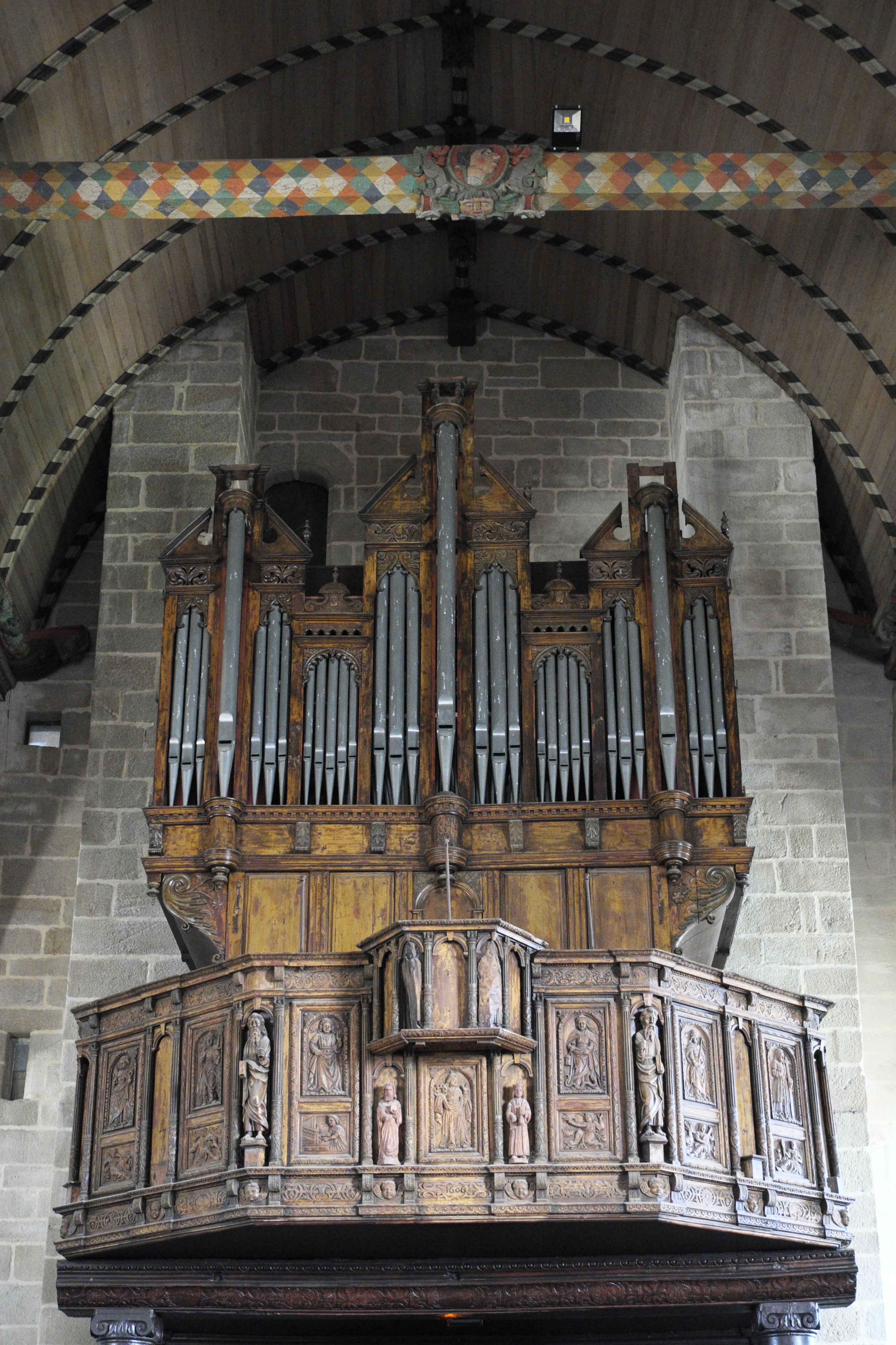 Katholische Pfarrkirche Notre-Dame-de-Croaz-Batz in Roscoff im Département Finistère (Region Bretagne/Frankreich), Orgel aus dem 17. Jahrhundert